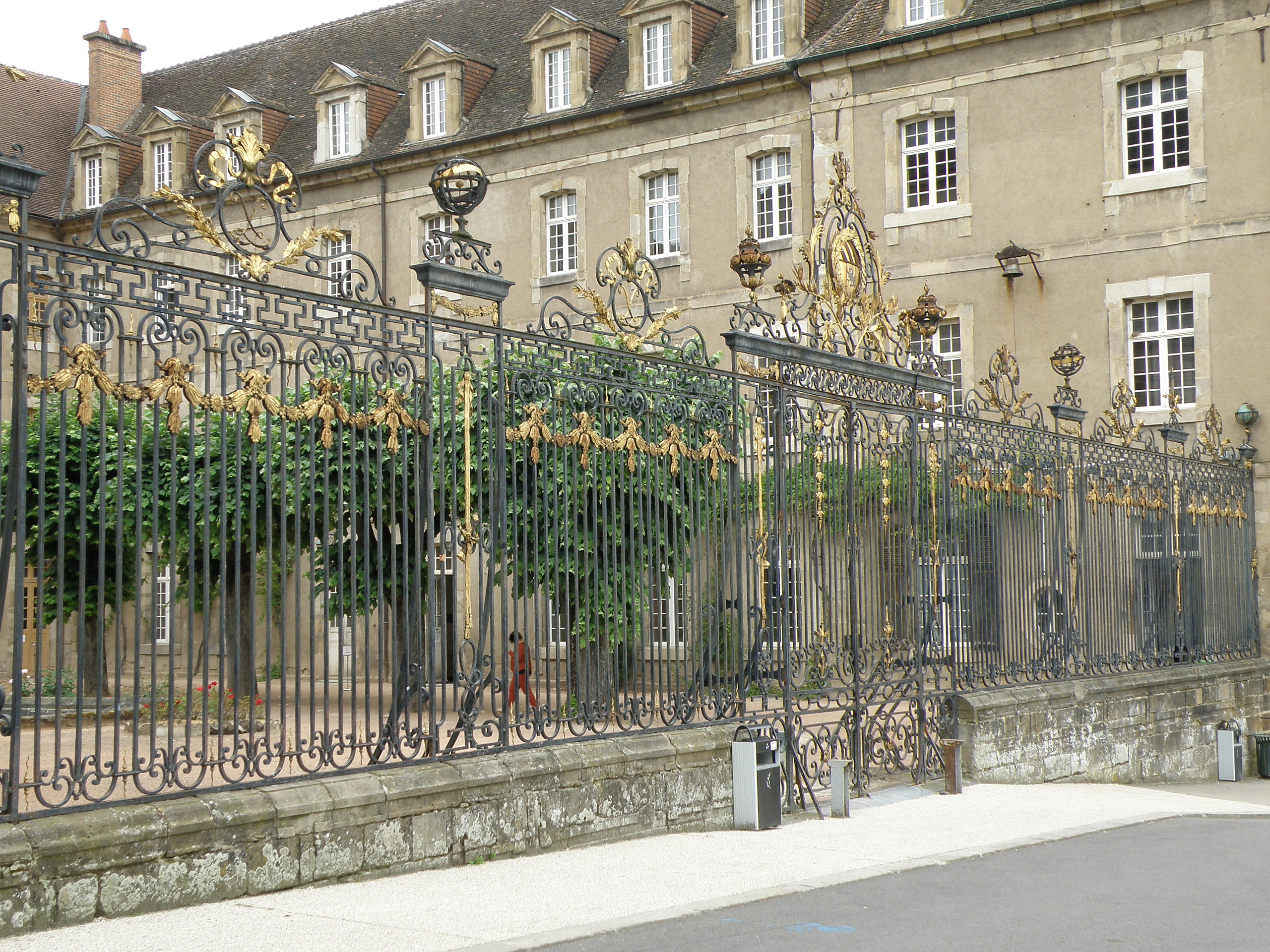 Autun (Saône-et-Loire, Bourgogne, France). Lycée Bonaparte.